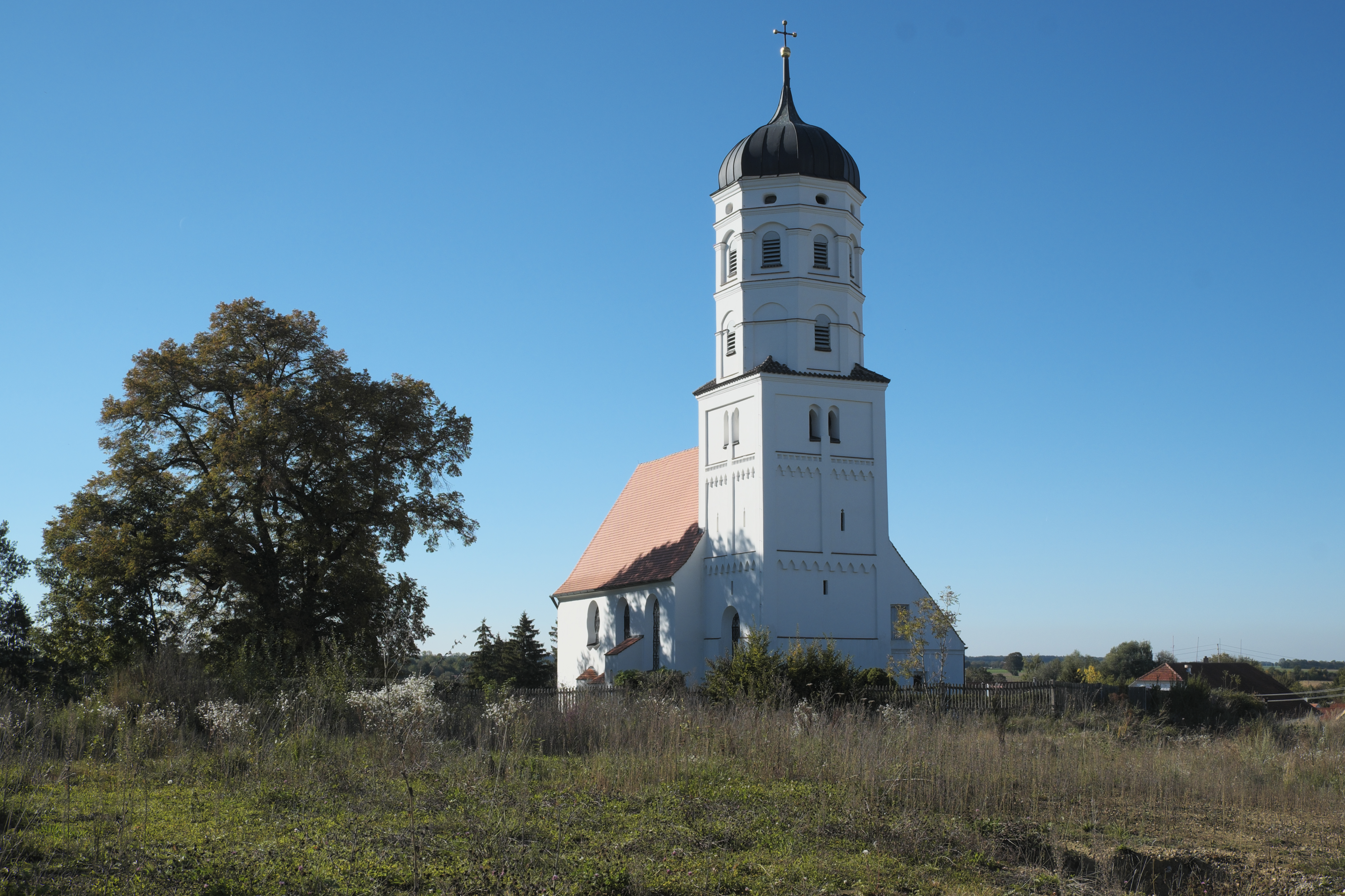 Katholische Filialkirche Unsere Liebe Frau in Petzenhausen, einem Ortsteil von Weil (Oberbayern) im Landkreis Landsberg am Lech (Bayern/Deutschland)